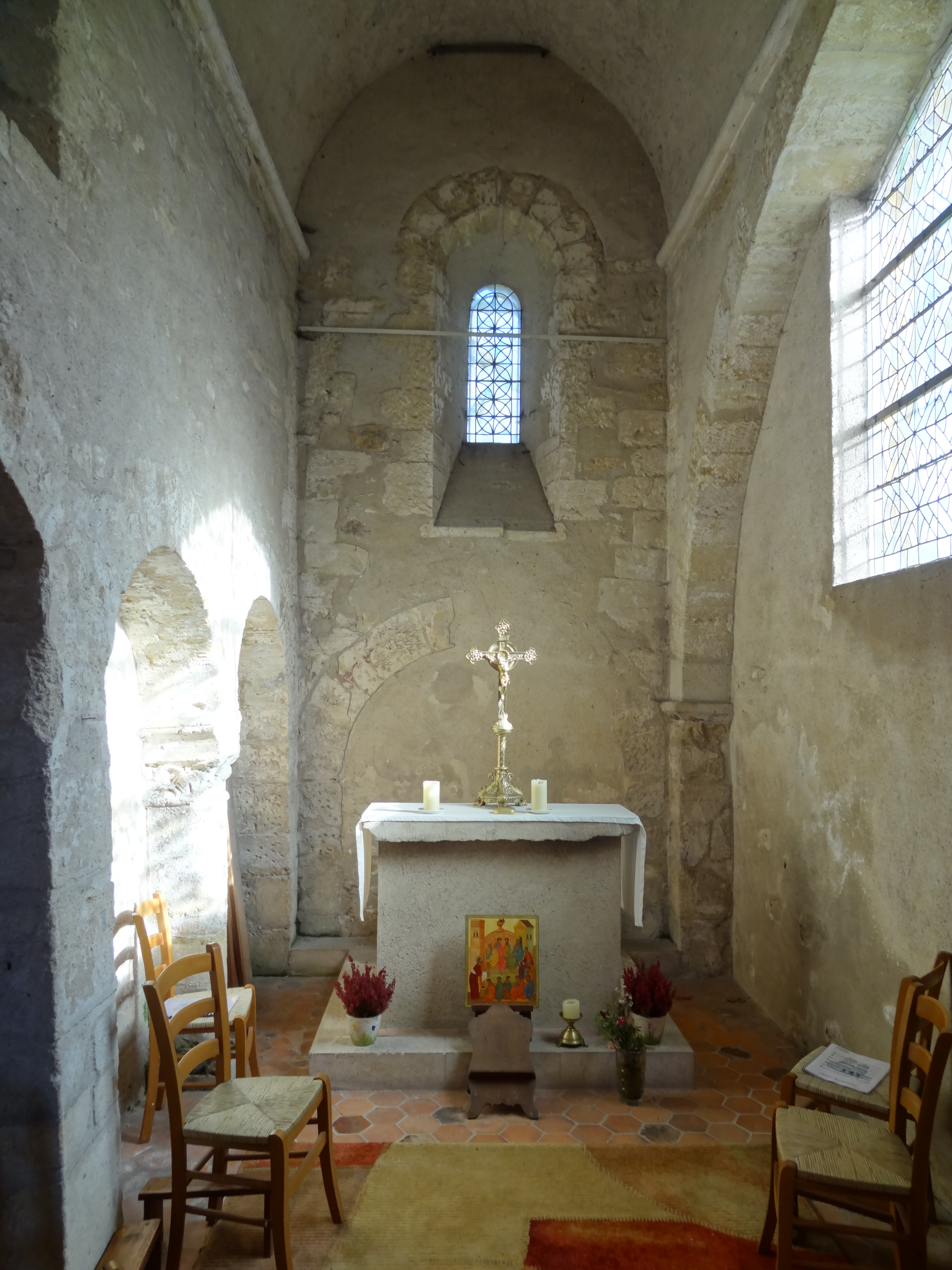 Intérieur de l'église - voir titre.